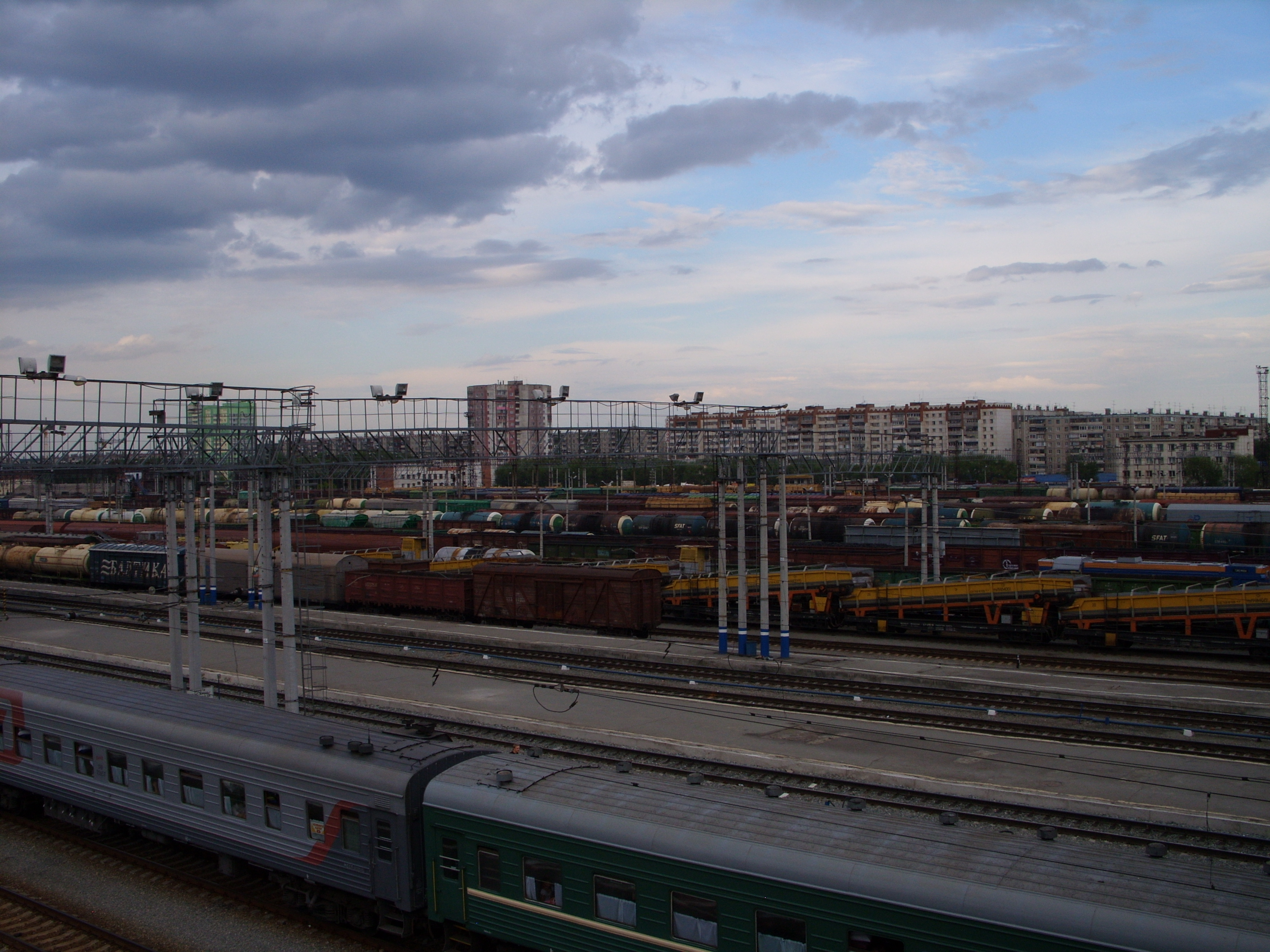 снимки июля 2009 г.